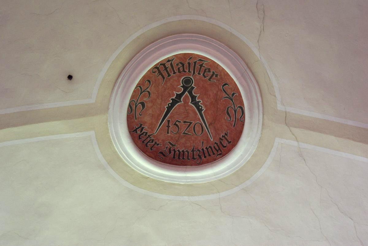 Schlussstein in der Kirche St. Zeno in 83435 Bad Reichenhall